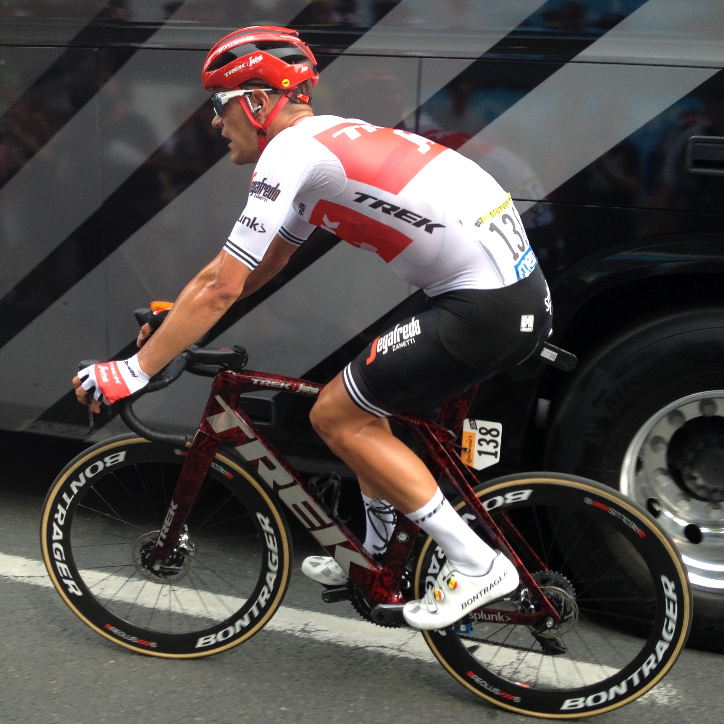 Grand Départ van de Tour de France in Brussel, finish in Laken op zaterdag 6 juli 2019